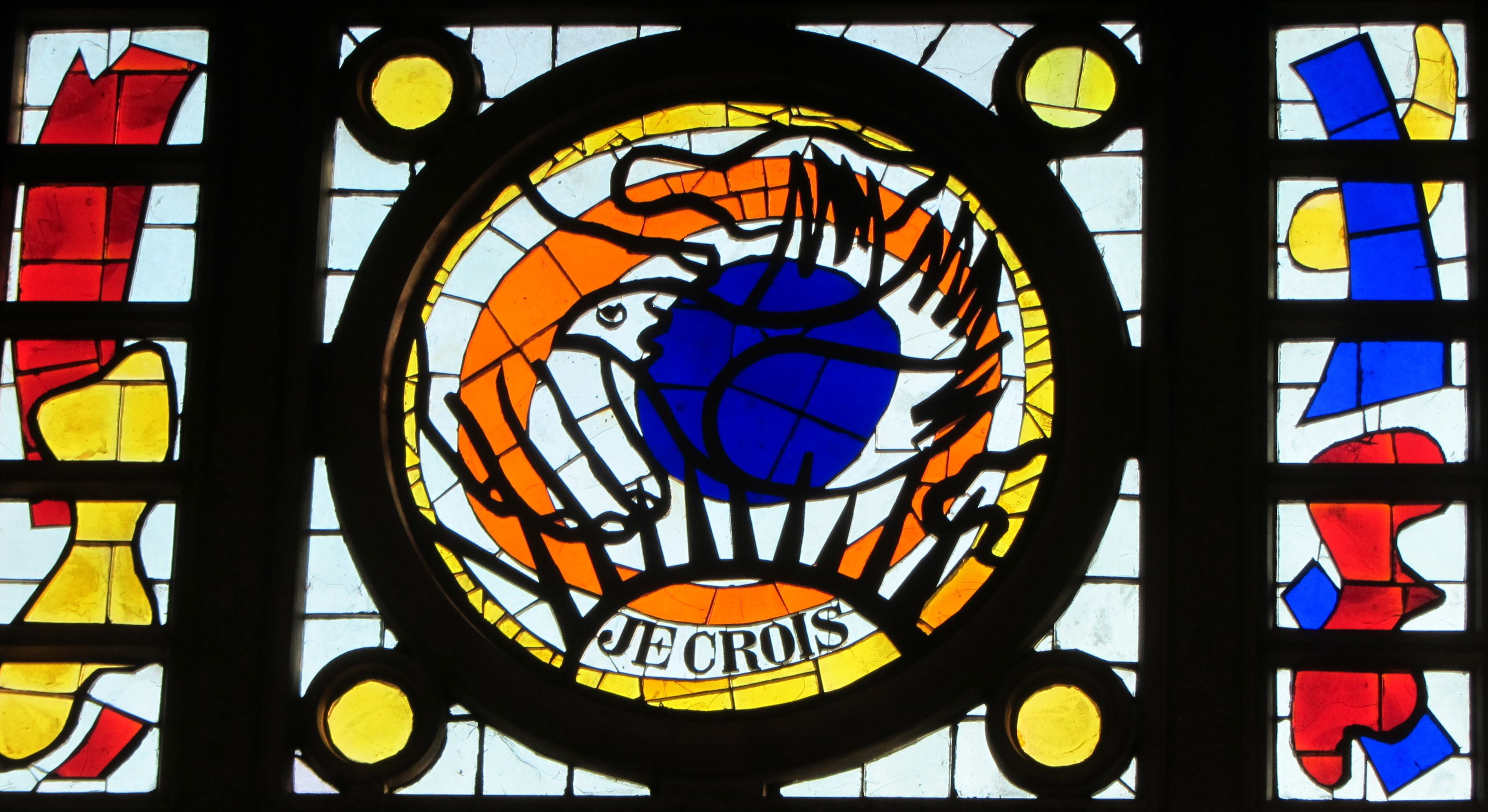 Kirchenfenster "Je crois" in der Kirche von Courfaivre, Kanton Jura, Schweiz